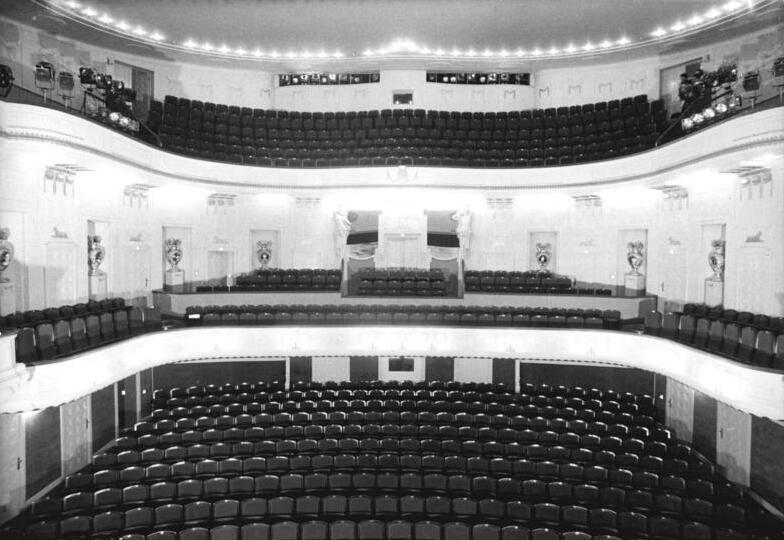 Cottbus, Theater, Großes Haus ADN-ZB Weißflog 3.10.86 Cottbus: Jugendstiltheater wird wiedereröffnet-Das große Haus des Theaters der Stadt Cottbus wird am 3.10.96 nach fünfjähriger Bauzeit wiedereröffnet. Das denkmalgeschützte Jugendstilhaus wurde modernisiert, u.a. erhielt es eine moderne Klimaanlage, eine um zehn Prozent schwenkbare Drehbühne, ein neues Tonstudio und eine Digital-Lichtregie. Architektonisch blieb es jedoch außen und innen originalgetreu erhalten. Das Gebäude war am 2.10.1908 eingeweiht worden.